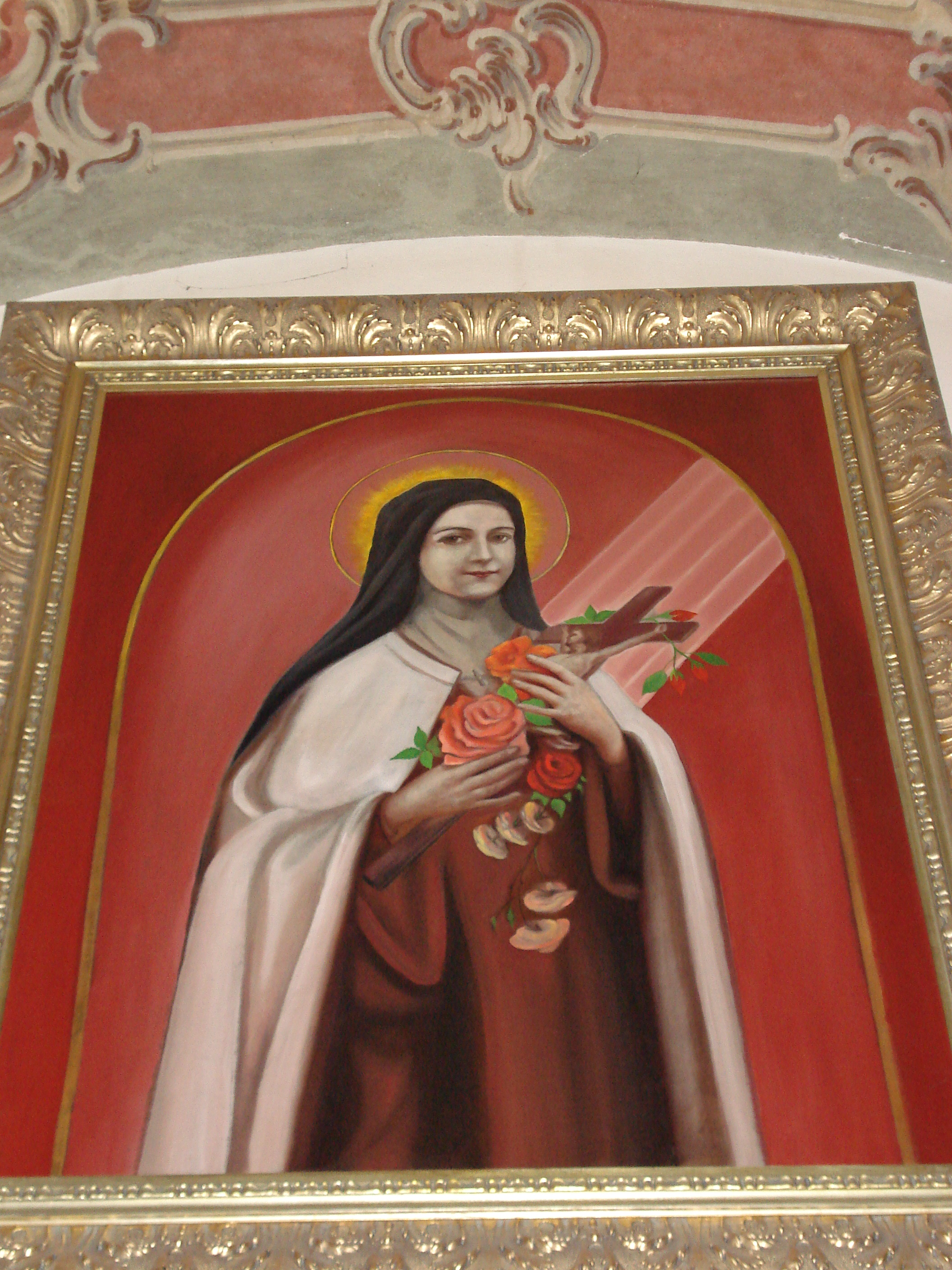 Obraz św. Teresy od Dzieciątka Jezus na krużgankach bazyliki oo. Karmelitów na Piasku w Krakowie